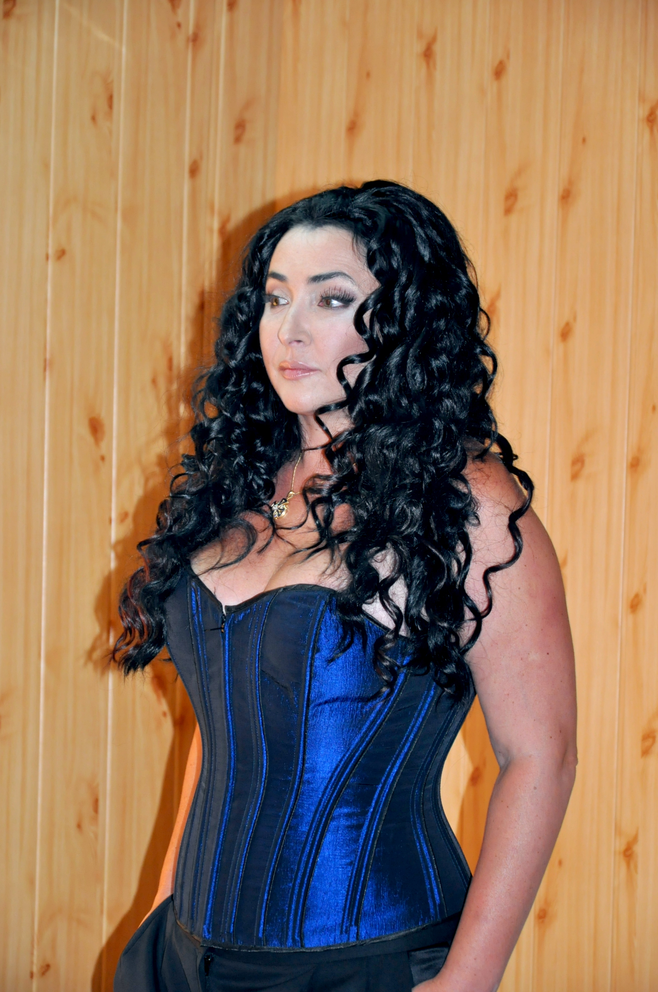 Лолита Милявская за кулисами шоу "Голос країни"